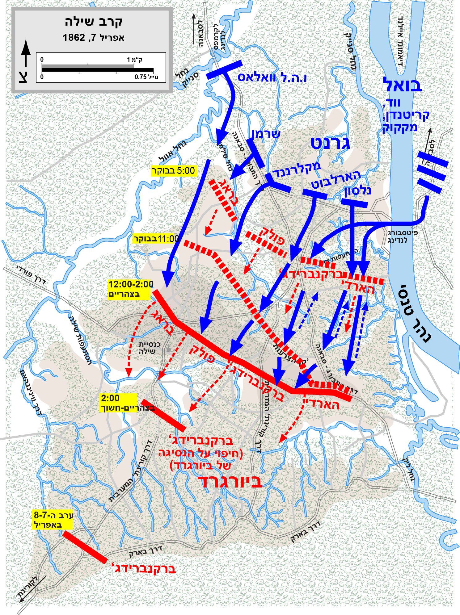 One of a series of three maps of the Battle of Shiloh of the American Civil War. Drawn in Adobe Illustrator CS5 by Hal Jespersen. Graphic source file is available at